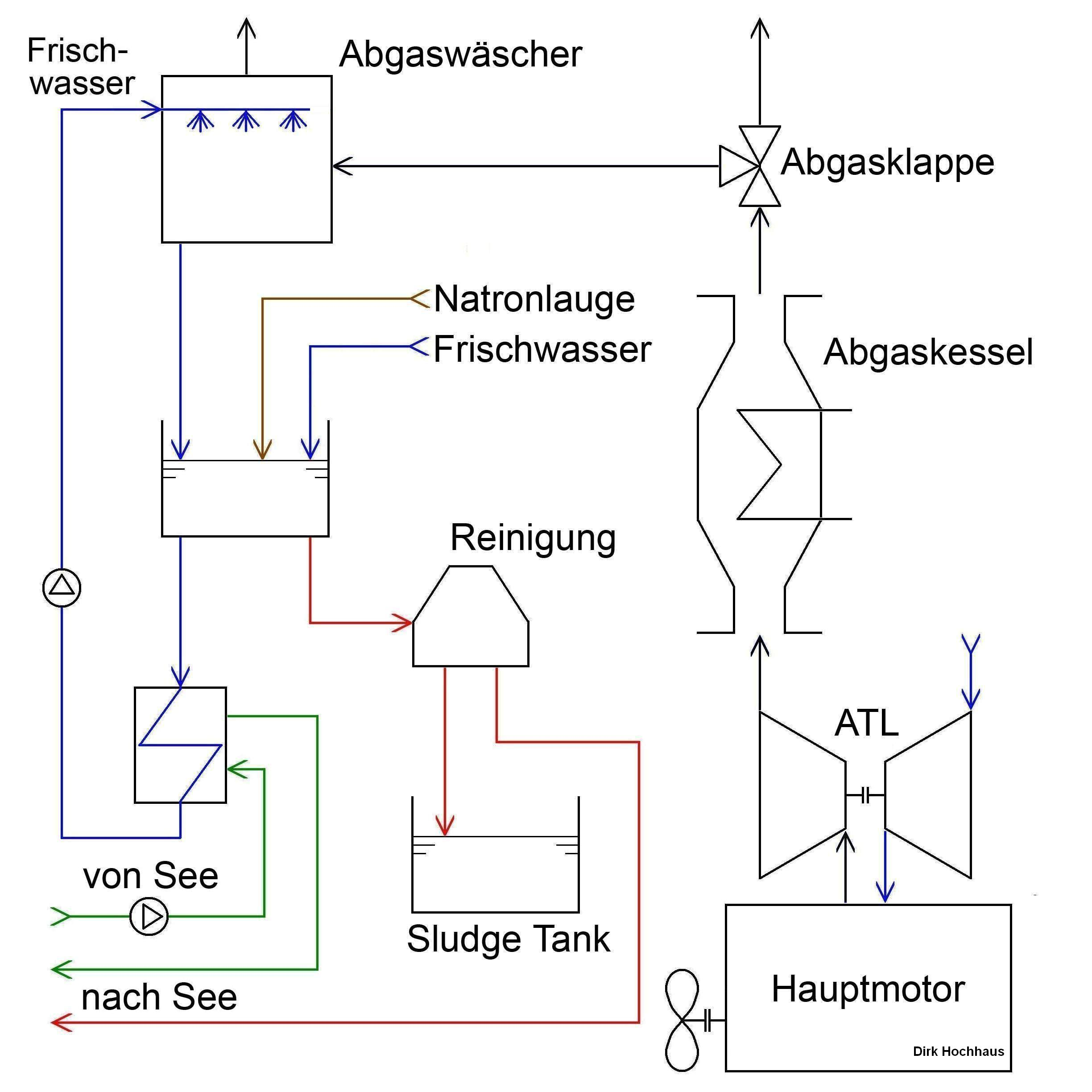 Schematische Darstellung einens Hybridsystems zur Schwefelreinigung